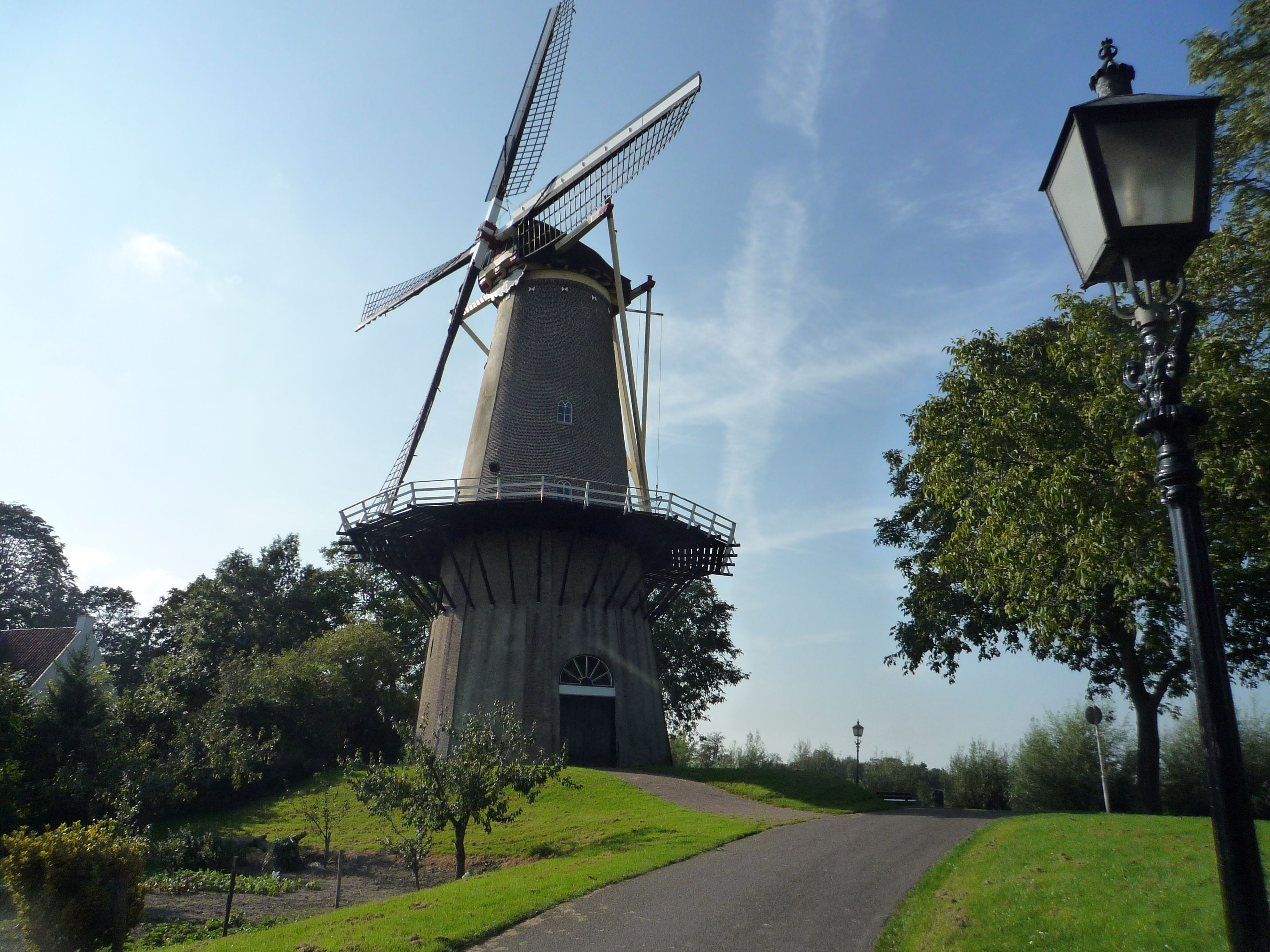 Buren molen